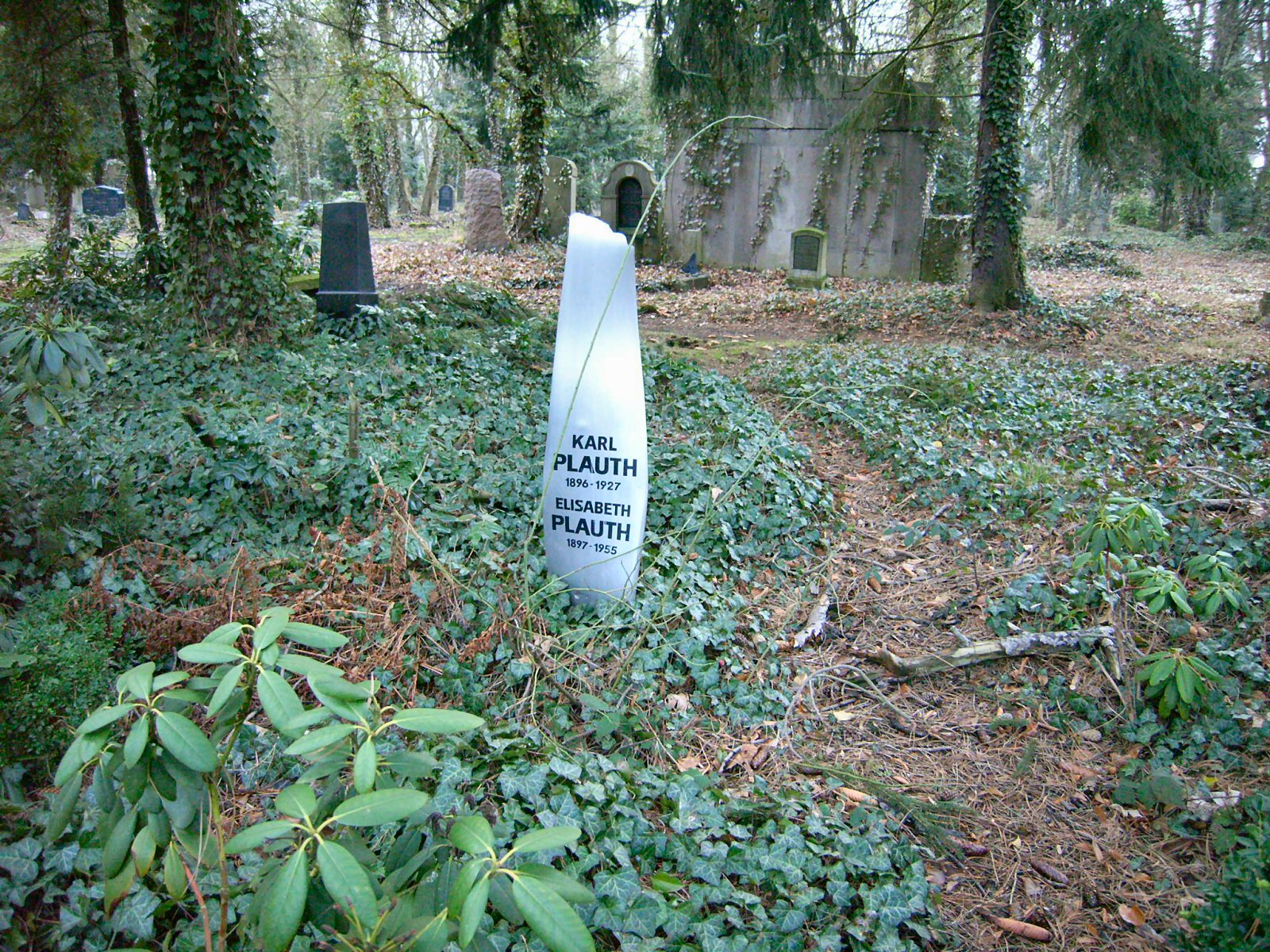 Ruhestätte von Karl und Elisabeth Plauth,Propeller vom Absturz